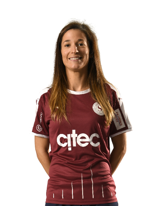 Photo portrait et photo licence de Sandy Maendly